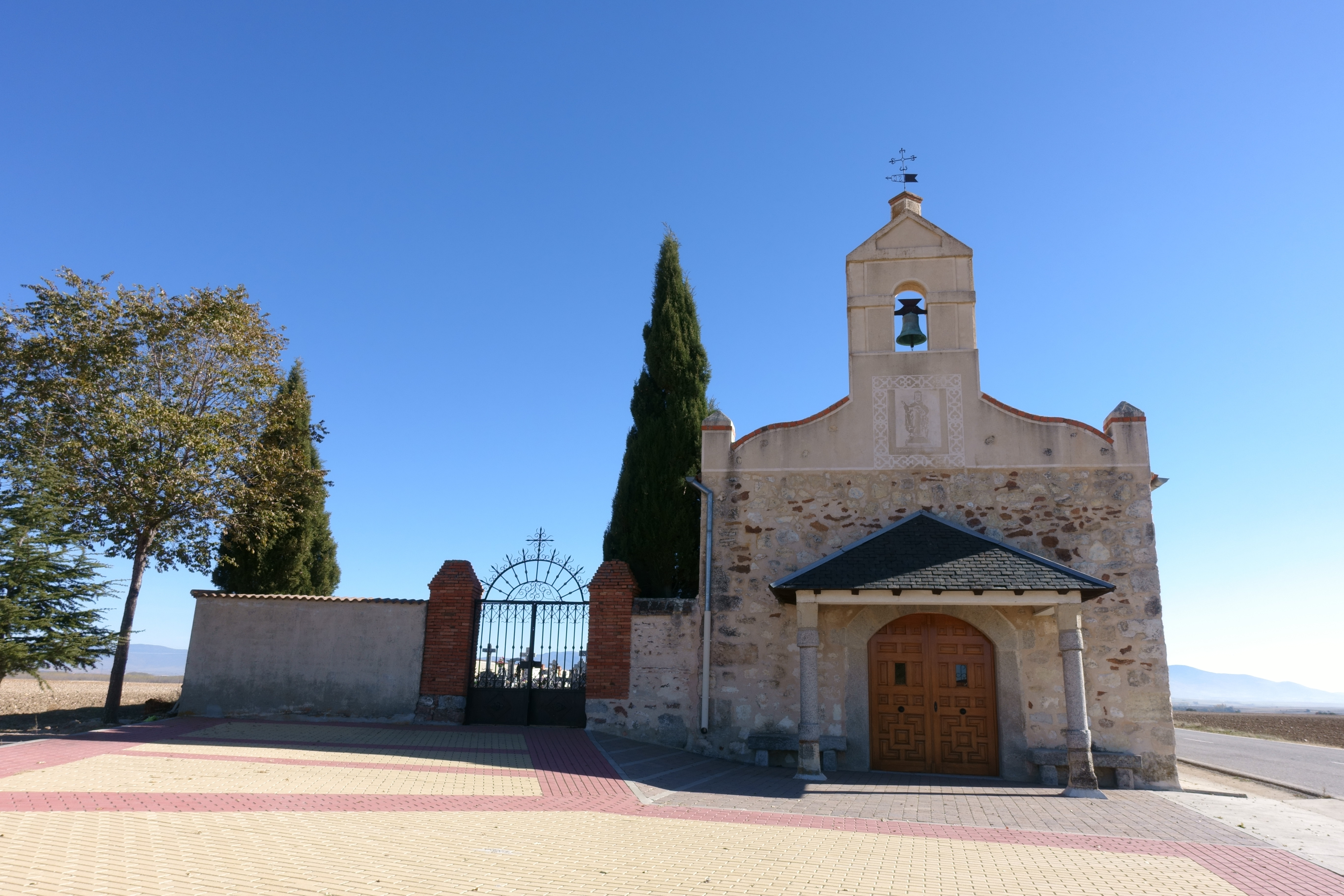 Ermita de Santa Catalina, Marazoleja (Segovia, España).